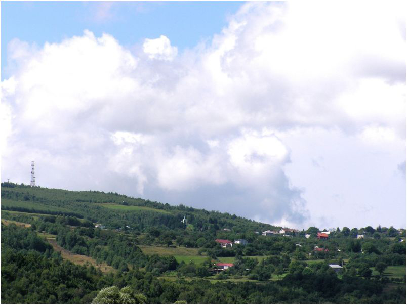 Celkový pohľad na Baňu